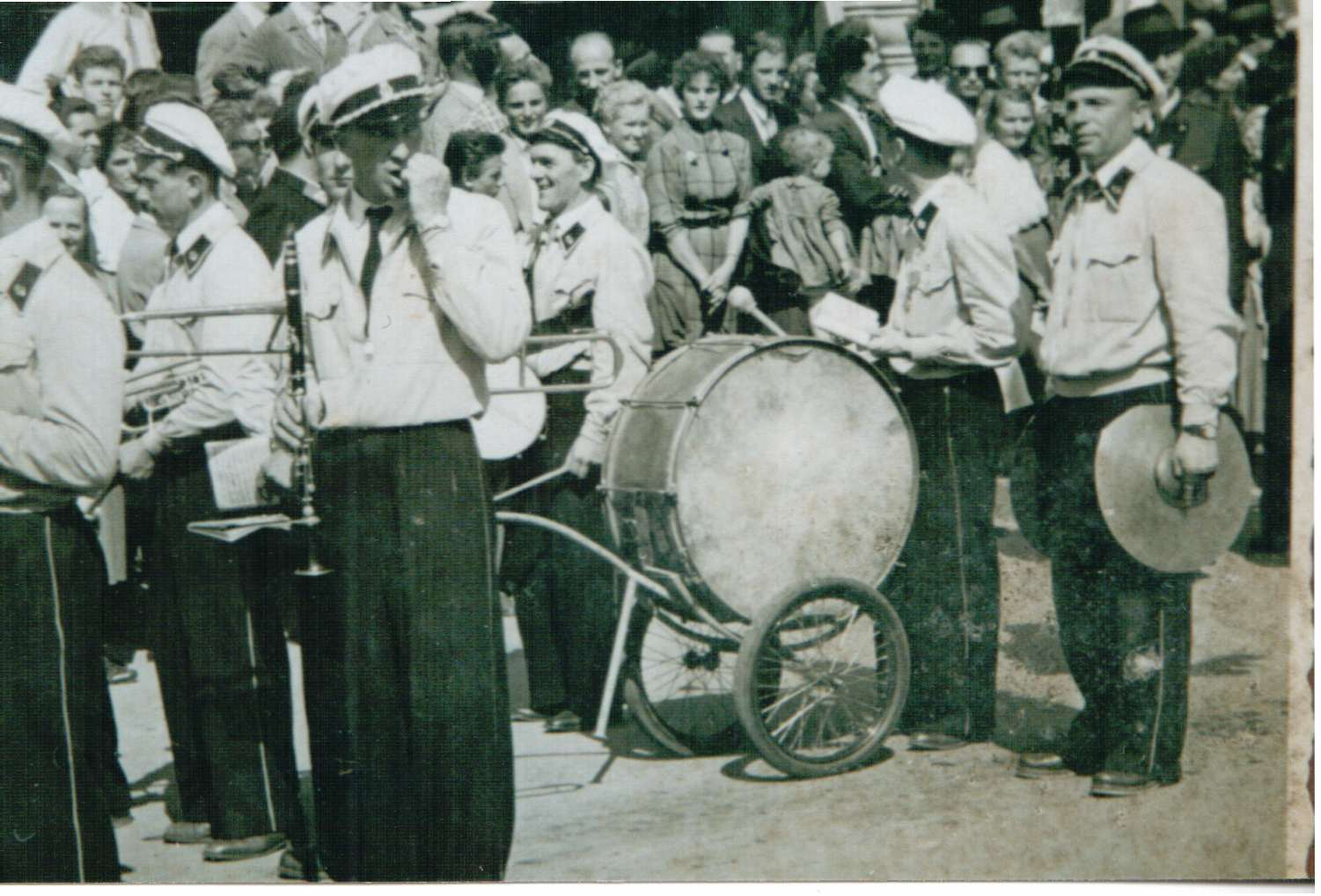 Grenzlandtrachtenkapelle Mureck in den 1950er Jahren.